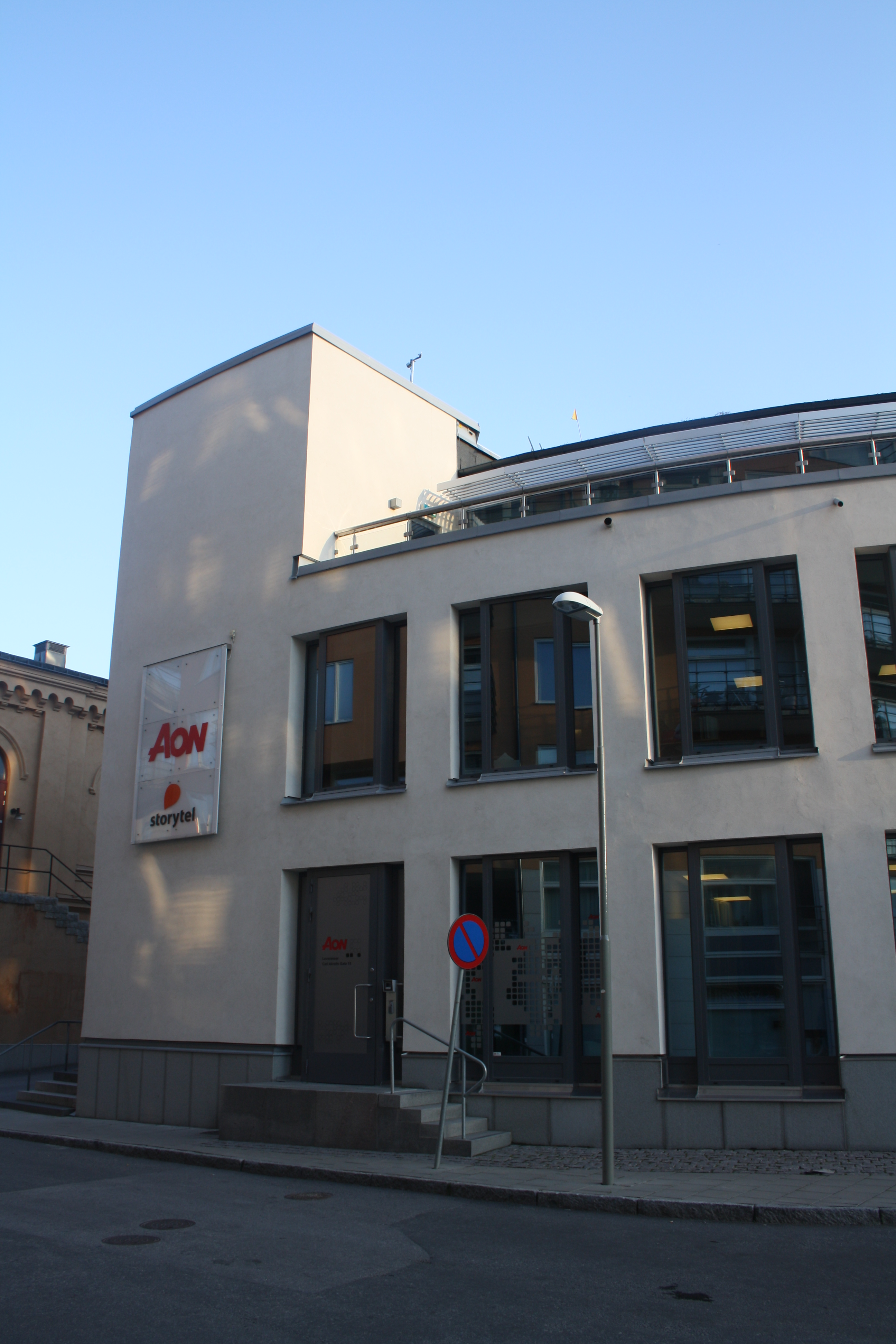 Storytel